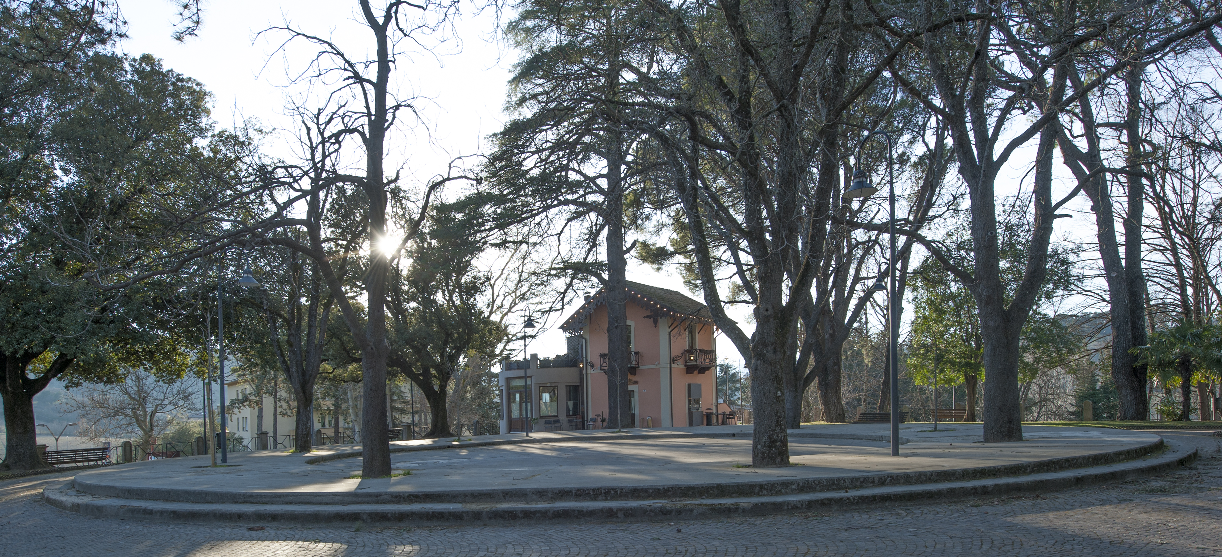 Spoleto - Casina dell'Ippocastano